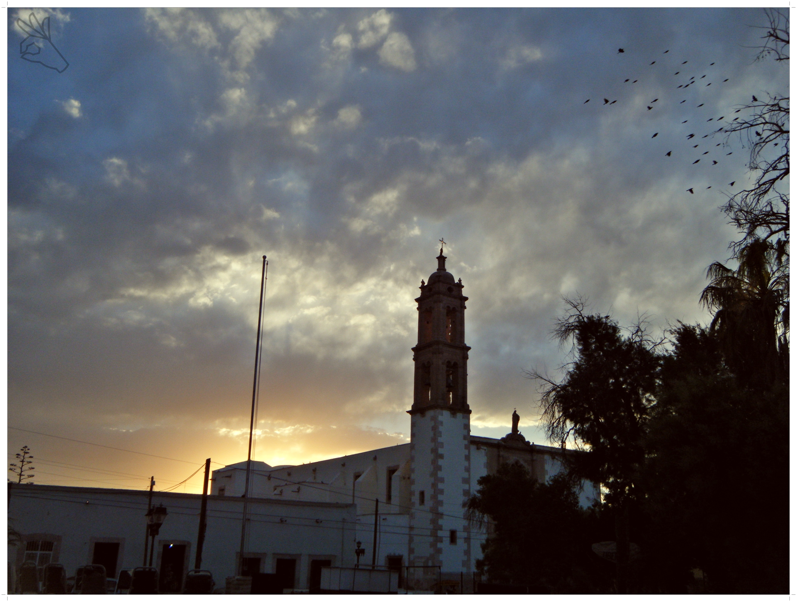 sunset